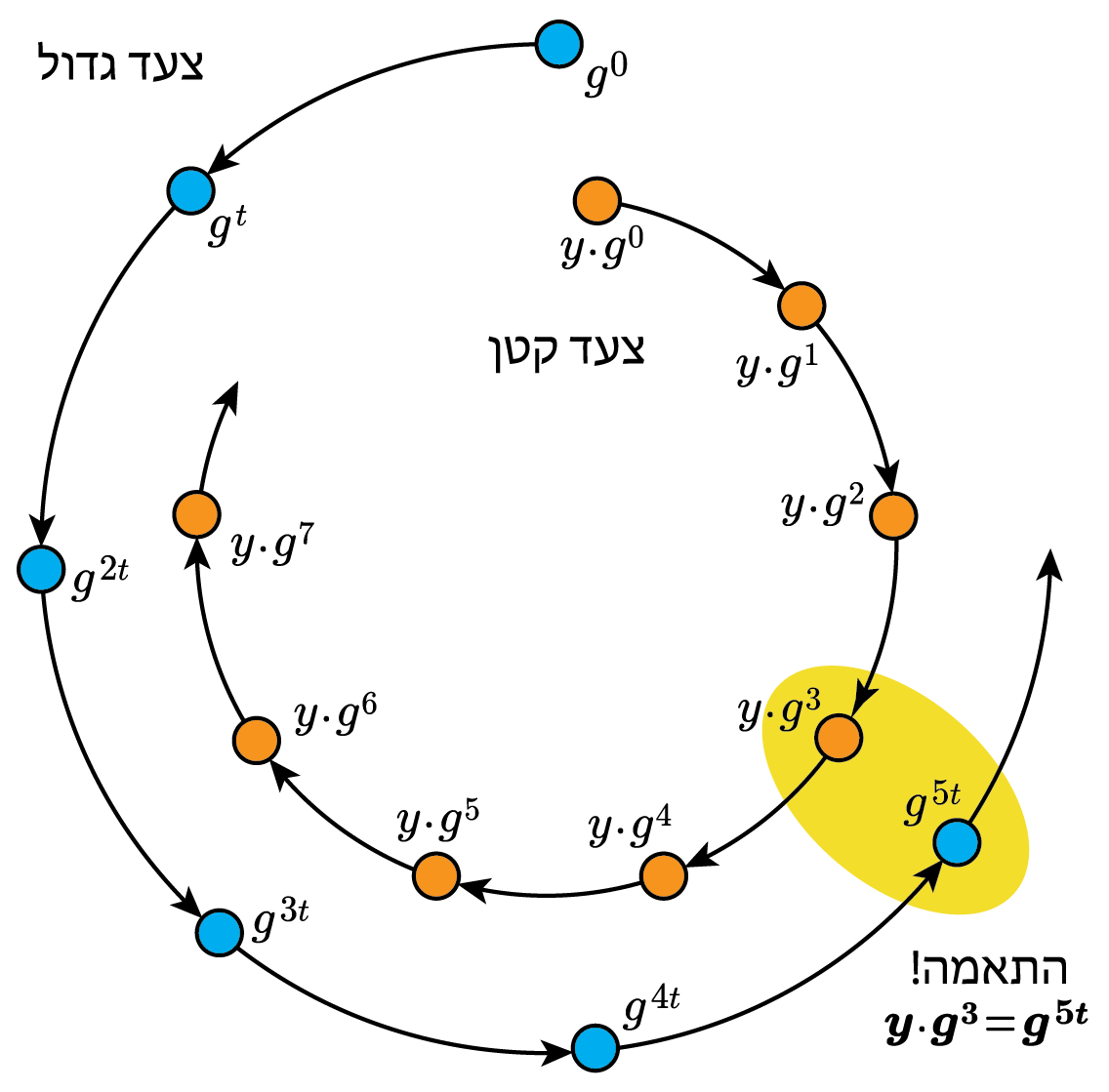 המחשה של אלגוריתם צעד-קטן צעד-גדול